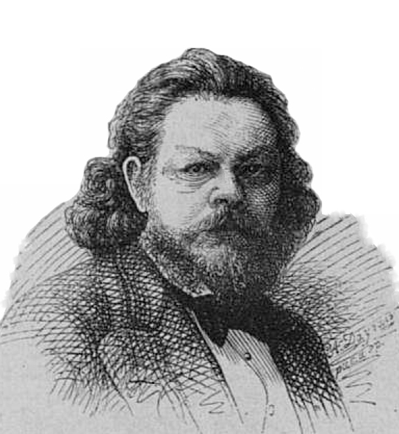 Даугель Август Иванович, гравёр